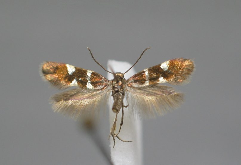 Antispila metallella